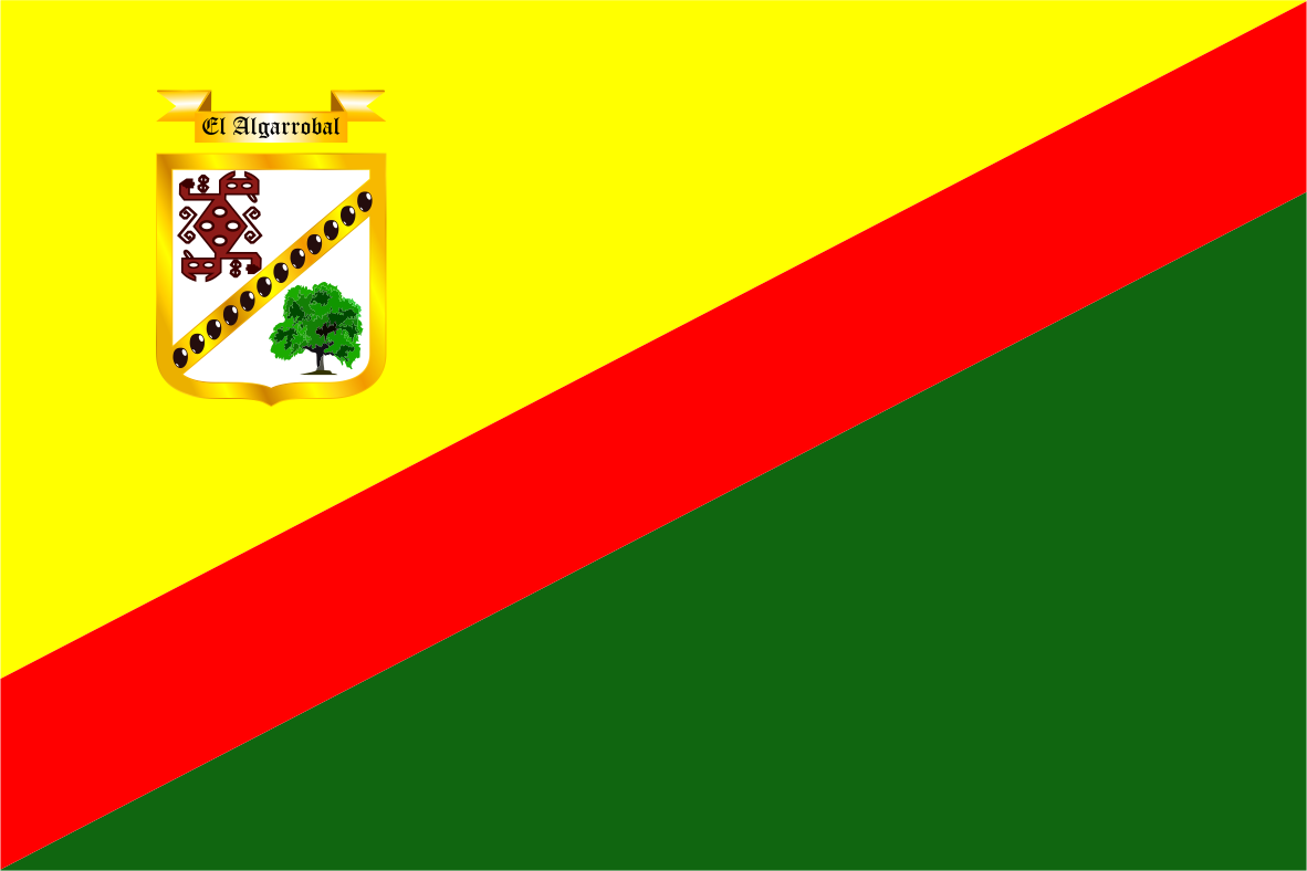 Distrito de EL Algarrobal - Provincia de Ilo - Región Moquegua